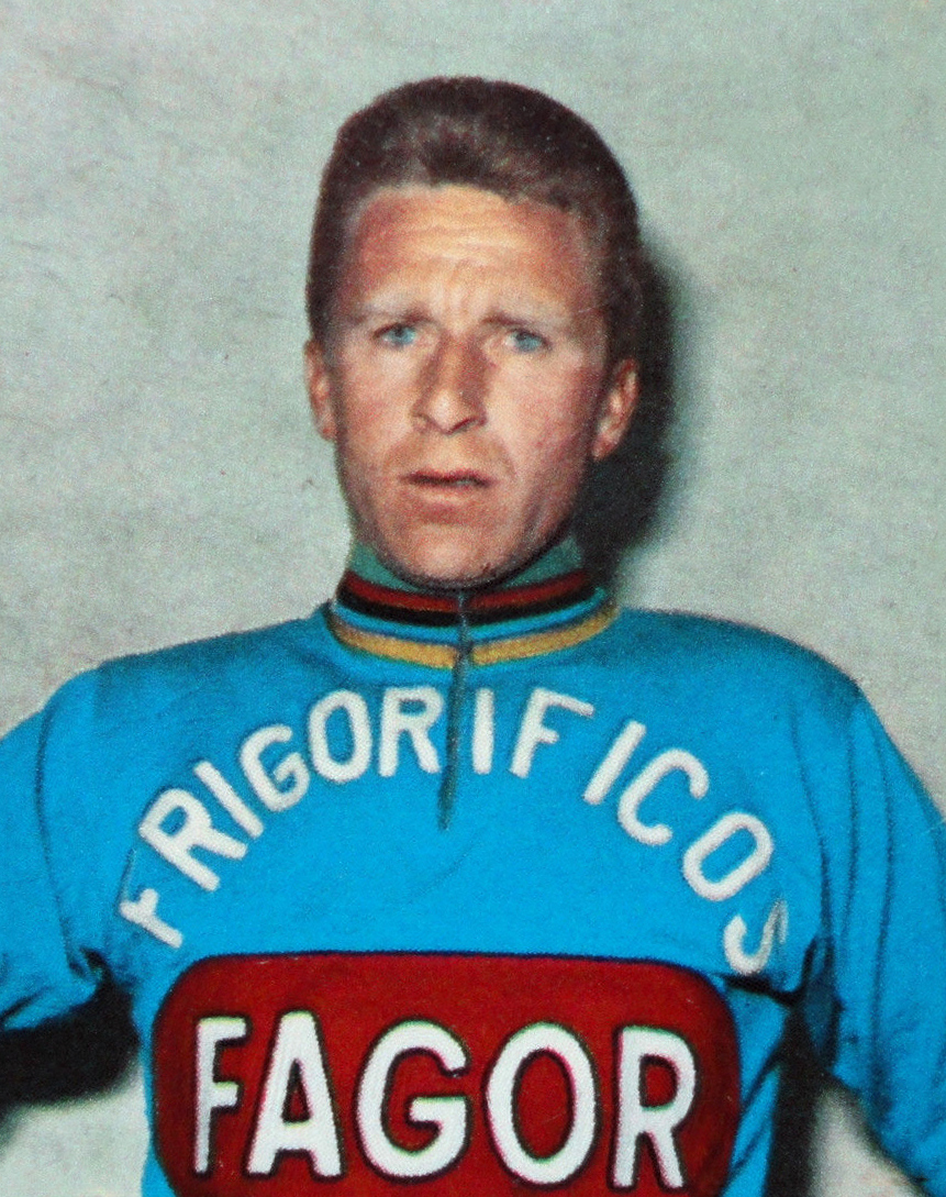 Figurina/Sticker CAMPIONI DELLO SPORT 1968/69-n.184-FRANCISCO GABICA